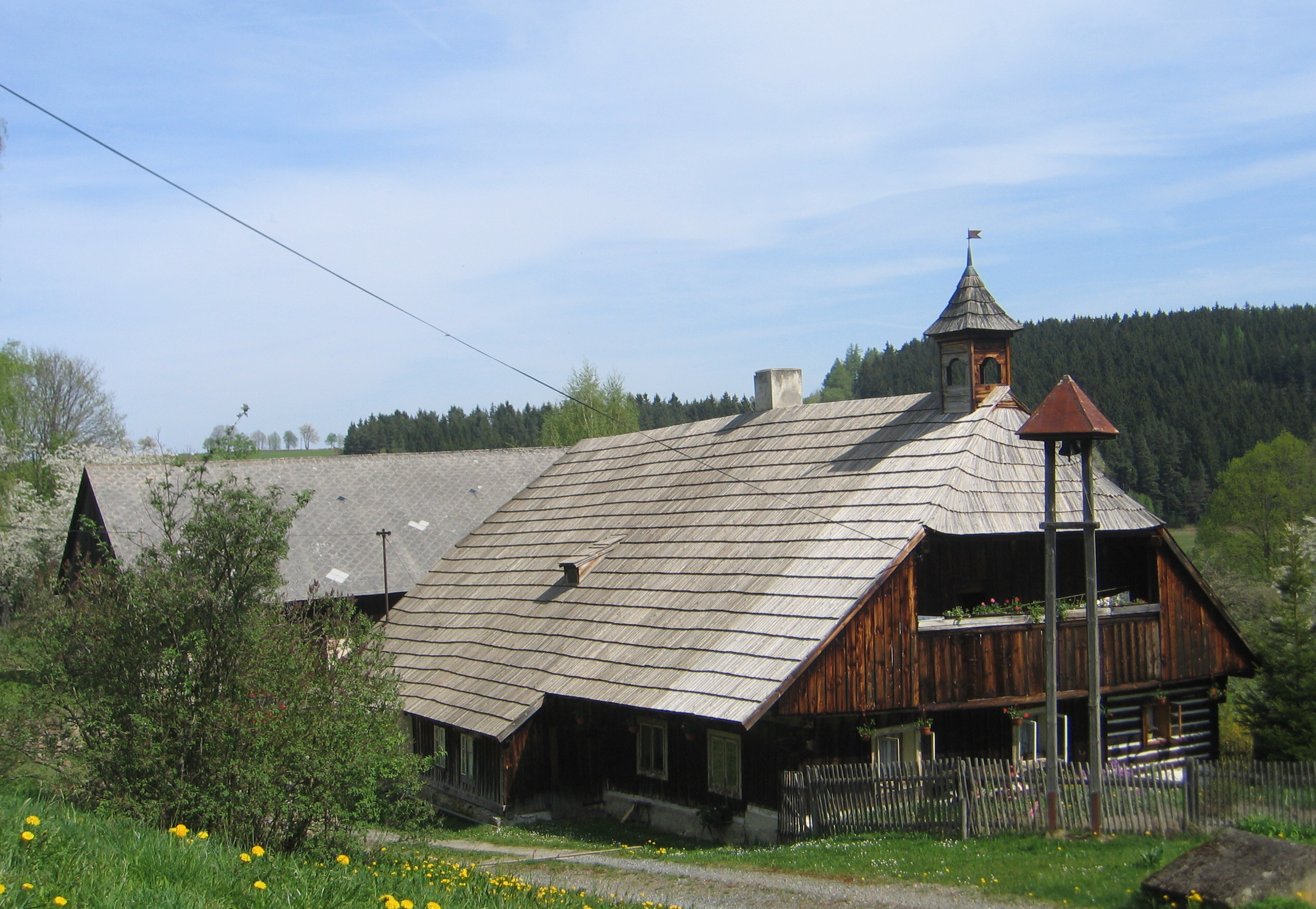 Venkovská usedlost (Zvíkov), Zvíkov 3